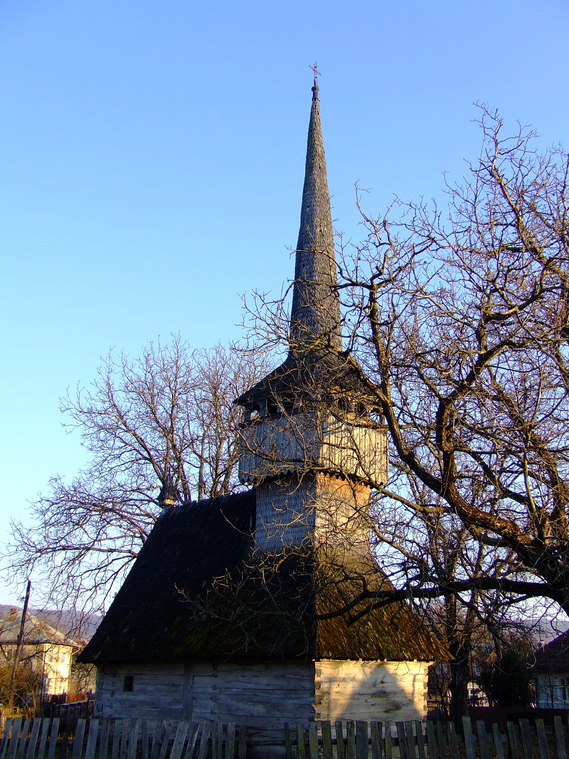 Biserica de lemn Sf Maria din Letca, Sălaj. Autor: Bogdan Ilieş Data: decembrie 2005 Categorie:Biserici de lemn din Sălaj (imagini)